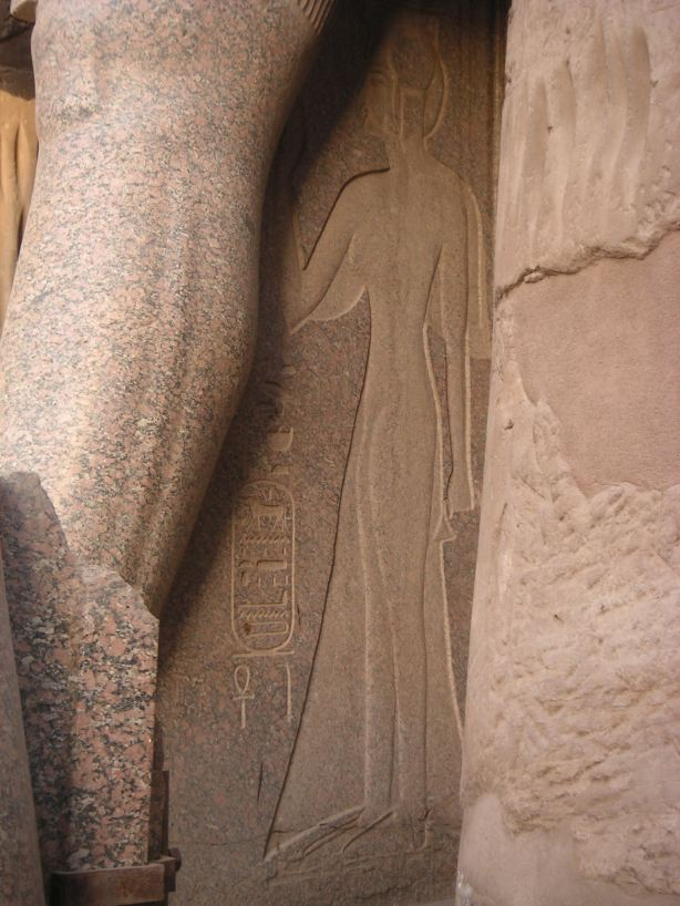 Relief de la grande épouse royale Bentanat Ire le long d'une jambe d'un des colosses debout de Ramsès II au temple de Louxor - XIXe dynastie égyptienne